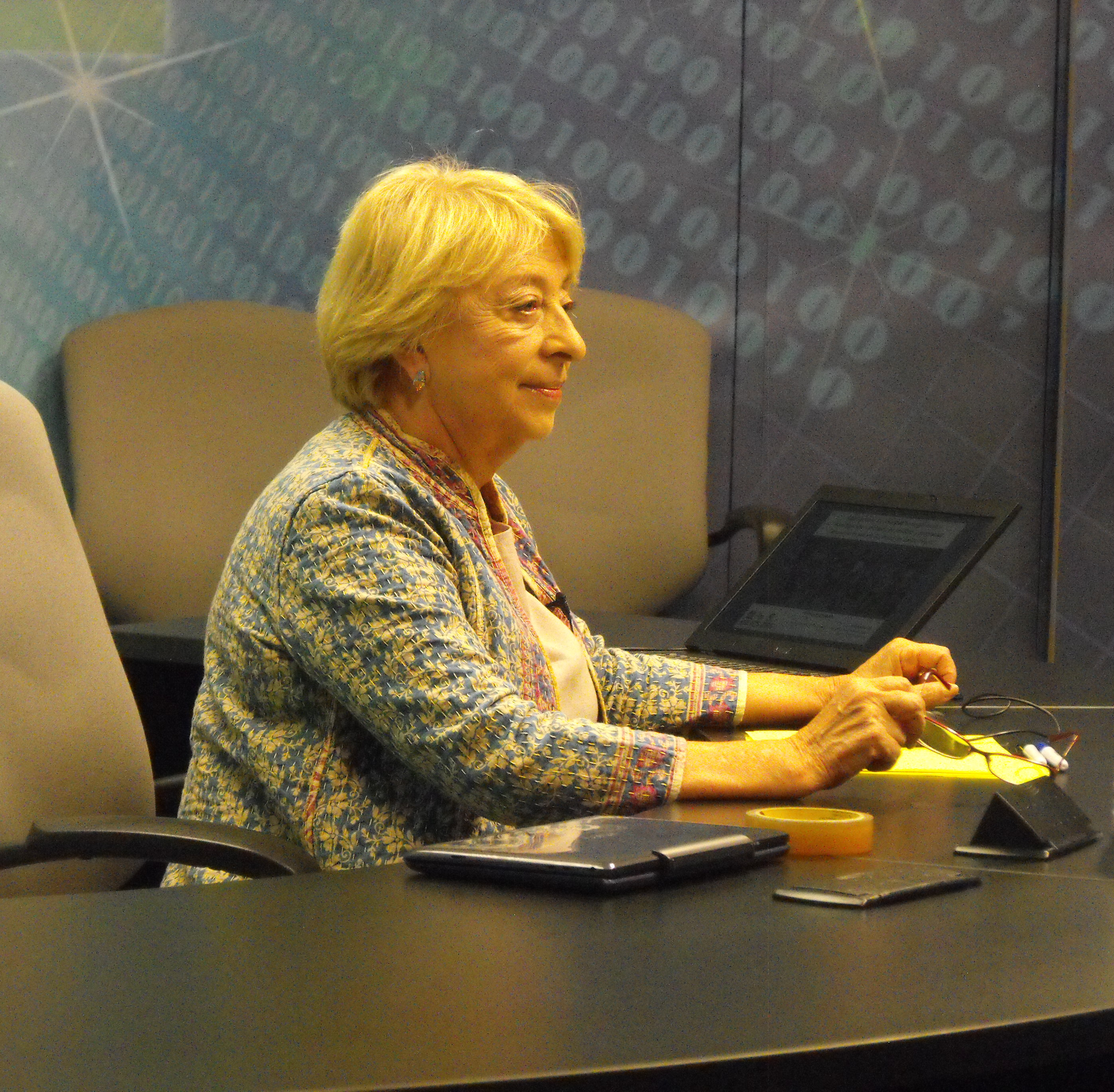 Gloria Bonder